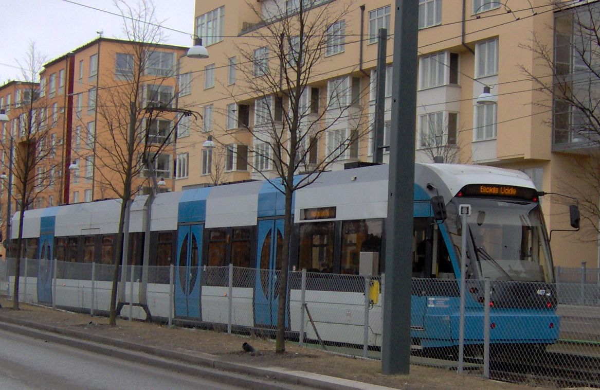 Tvärbanans spårvagn vid Sickla Udde. Hammarby Sjöstad i Stockholm.